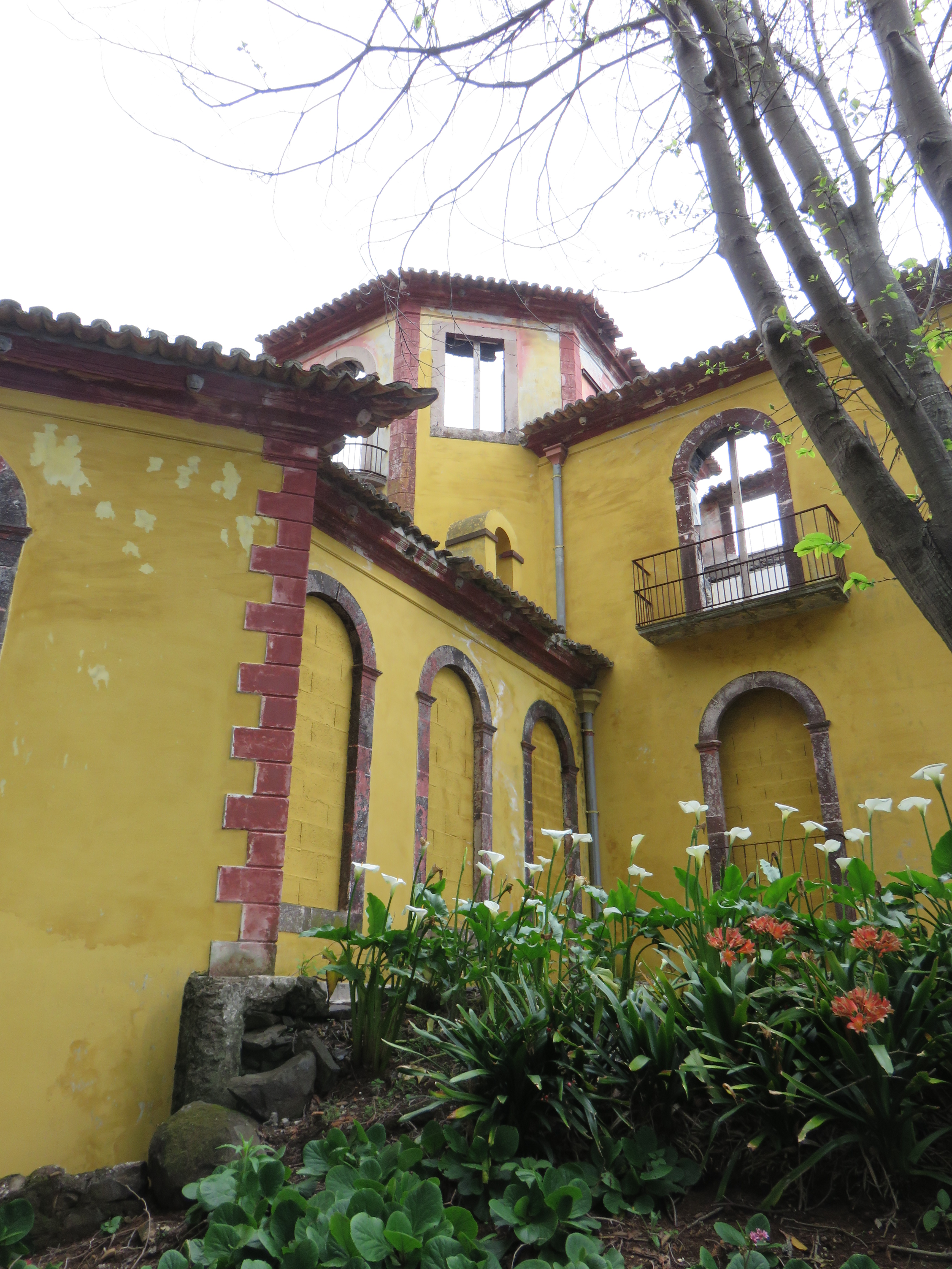 Quinta do Monte - quinta, jardins e parque no Monte, Funchal, Madeira, Portugal Cultural property Quinta do Monte, Monte, Funchal, Madeira, Portugal Q66815971, SIPA ID: 8371 Wiki Loves Monuments ID: DRC-M-220302041